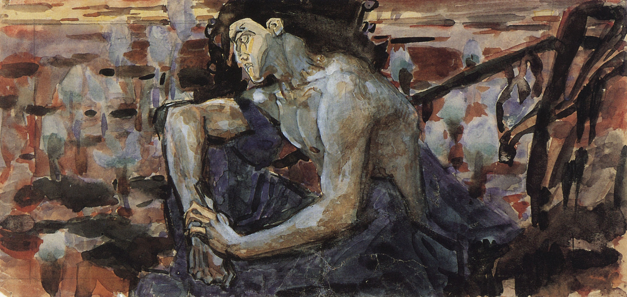 Демон (сидящий). 1890 Врубель Михаил